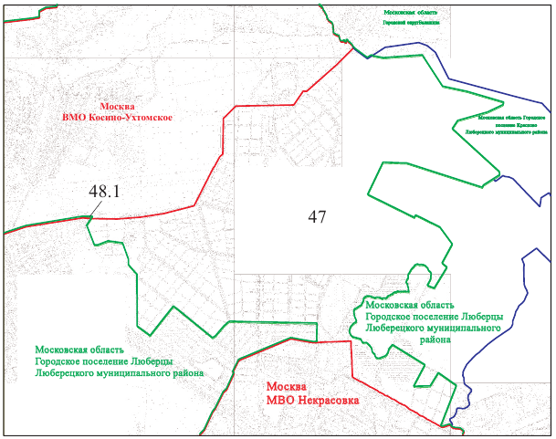 Картографическое описание границ Москвы и Московской области из "Соглашения об изменении границы между субъектами Российской Федерации городом Москвой и Московской областью". Лист 33 (Люберецкие поля).